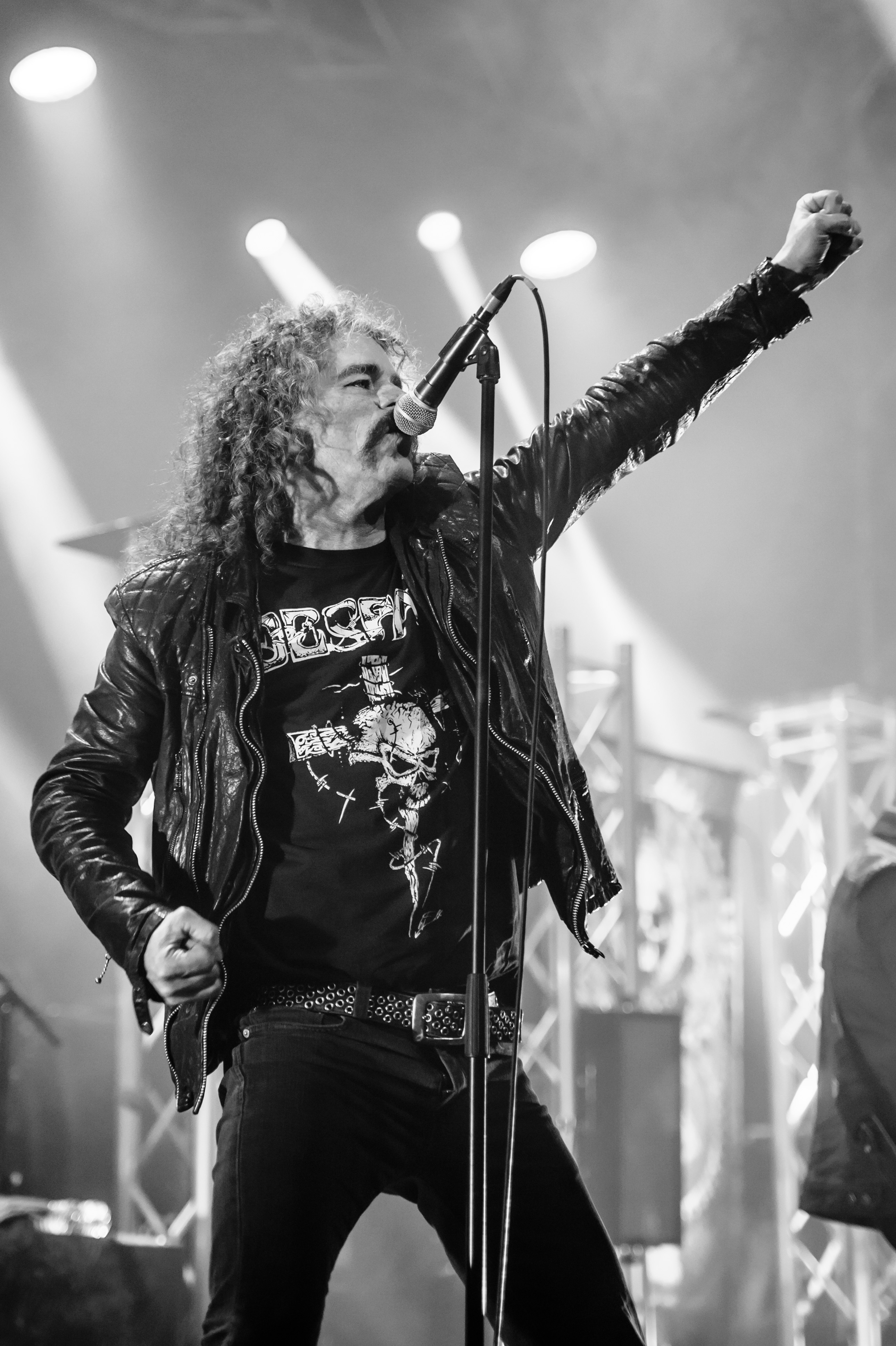 'Ruhrpott Metal Meeting 2017; Turbinenhalle Oberhausen': 'Over Kill'